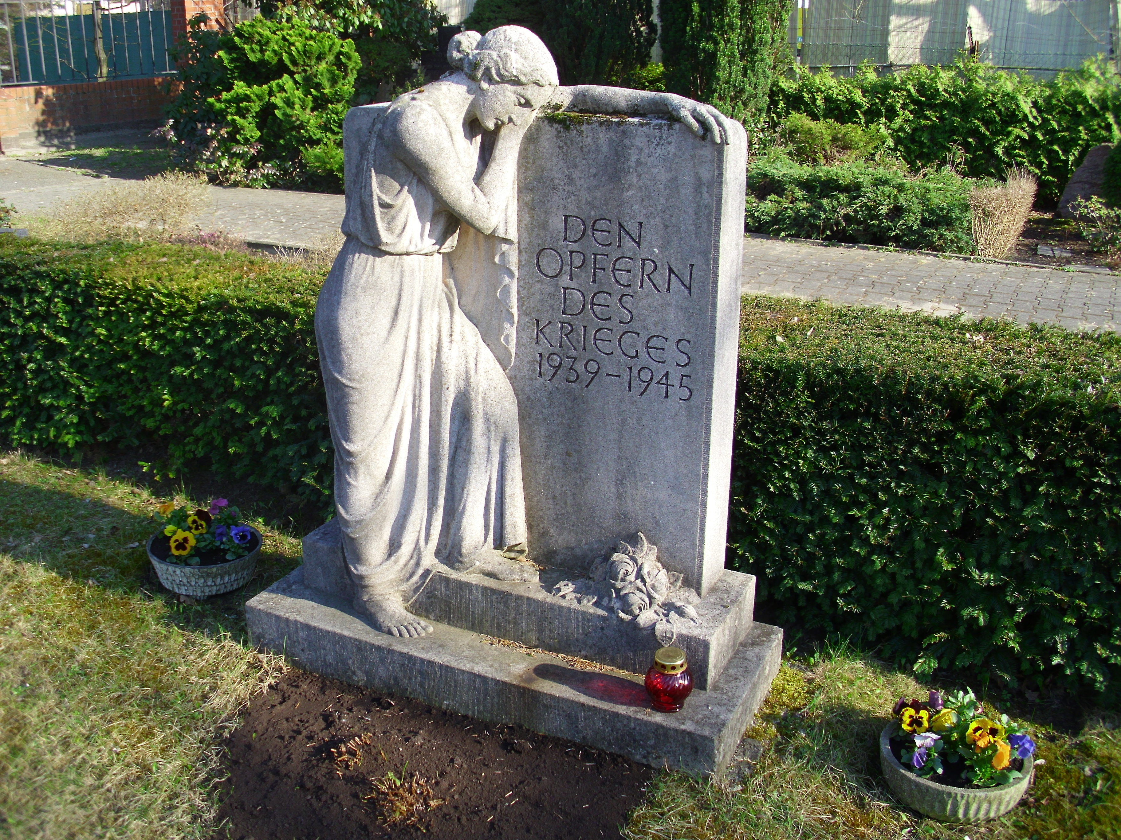 Gedenkstein „Den Opfern des Krieges 1939–1945“ auf dem Kreuz-Friedhof, Berlin-Lankwitz